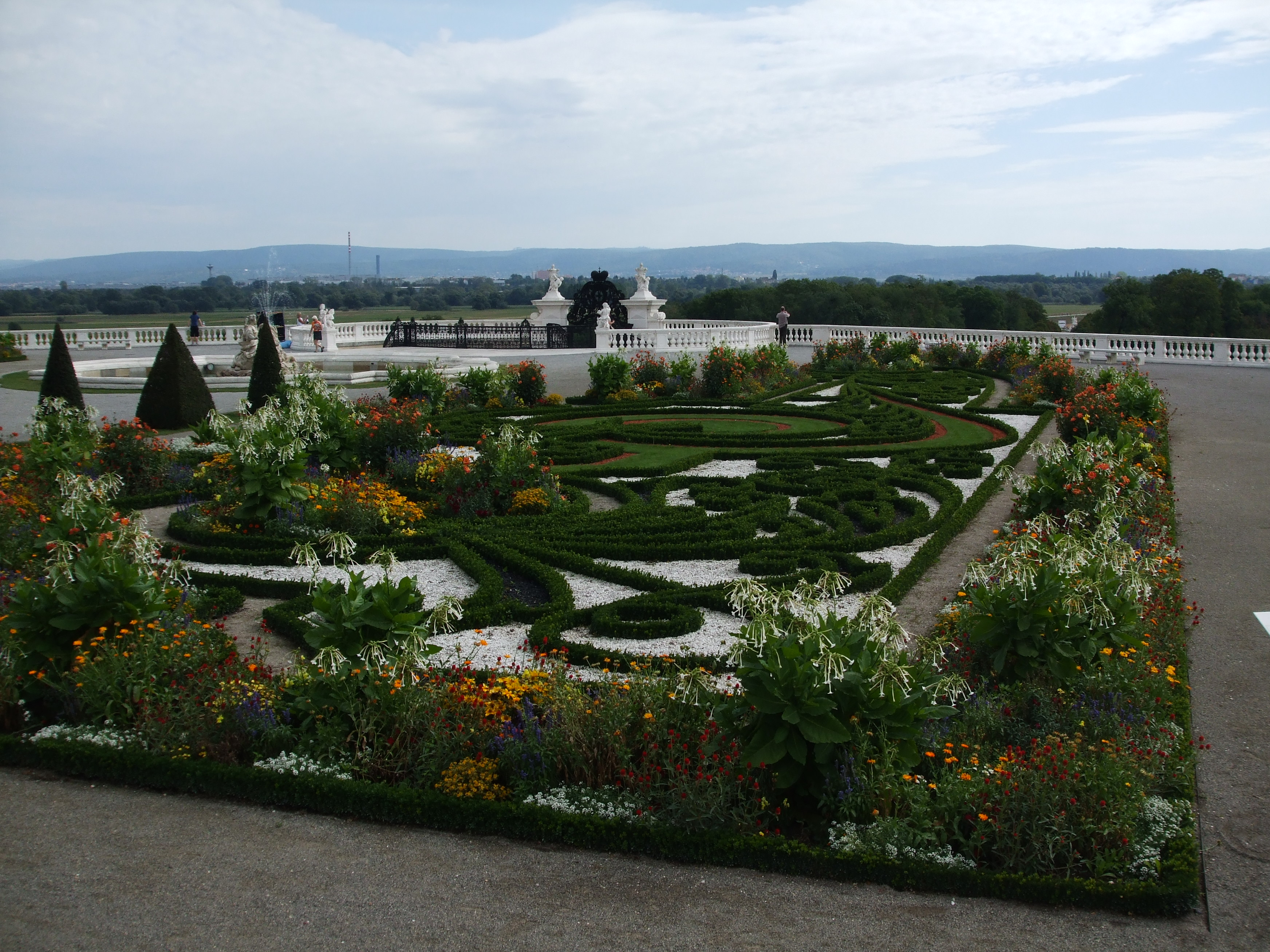 Schloss Hof